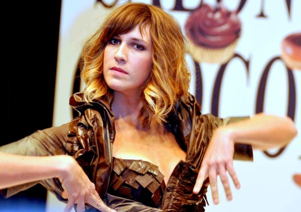 Daphnë Burki au salon du chocolat 2009